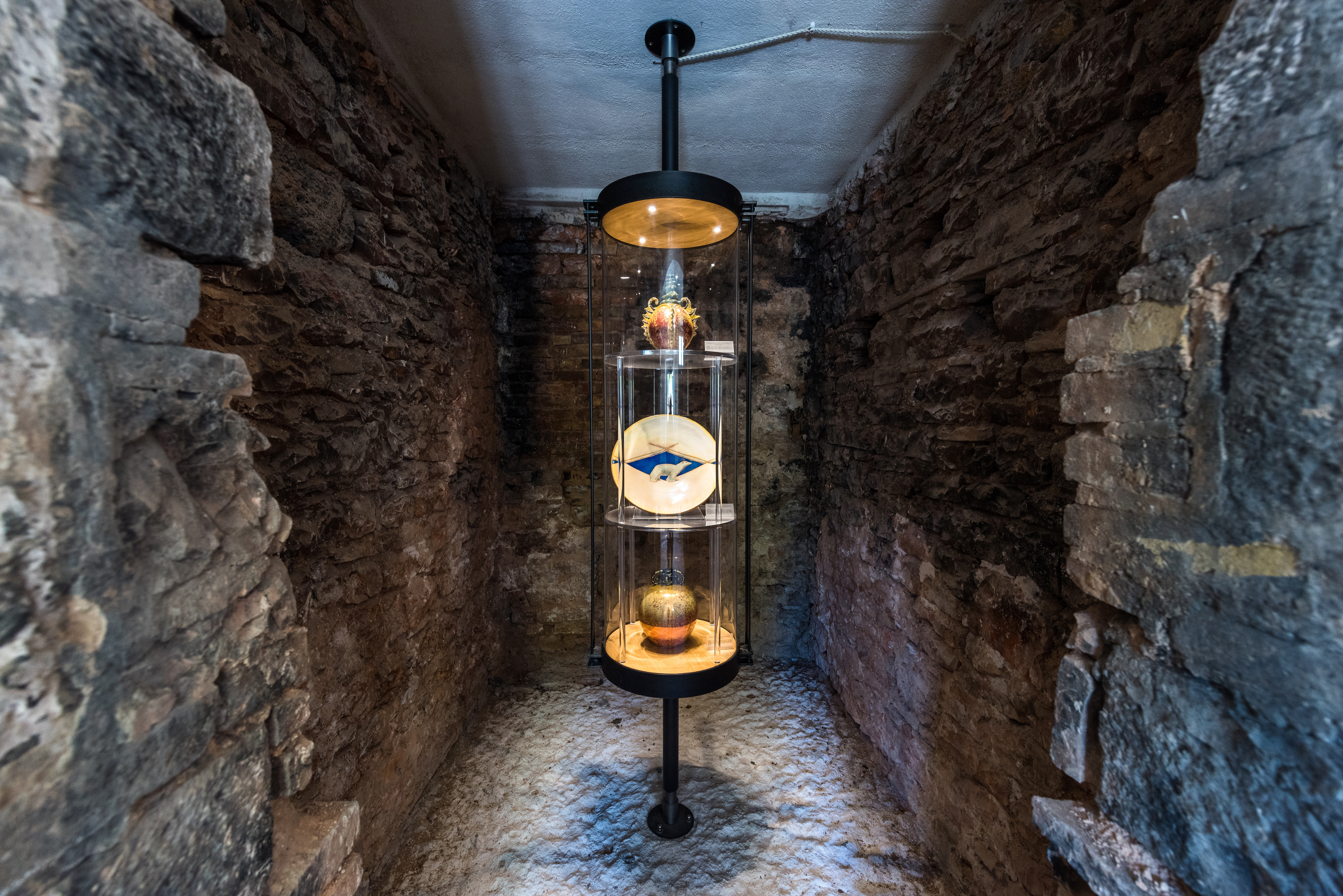 Sala della Fornace del Museo Opificio Rubboli, opere di Aldo Ajò